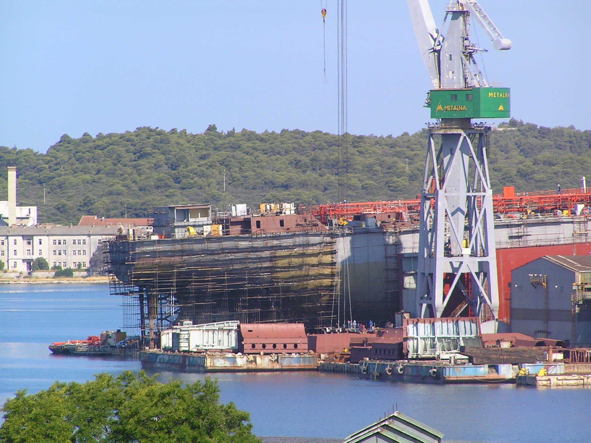 Uljanik shipyard in Pula, Croatia